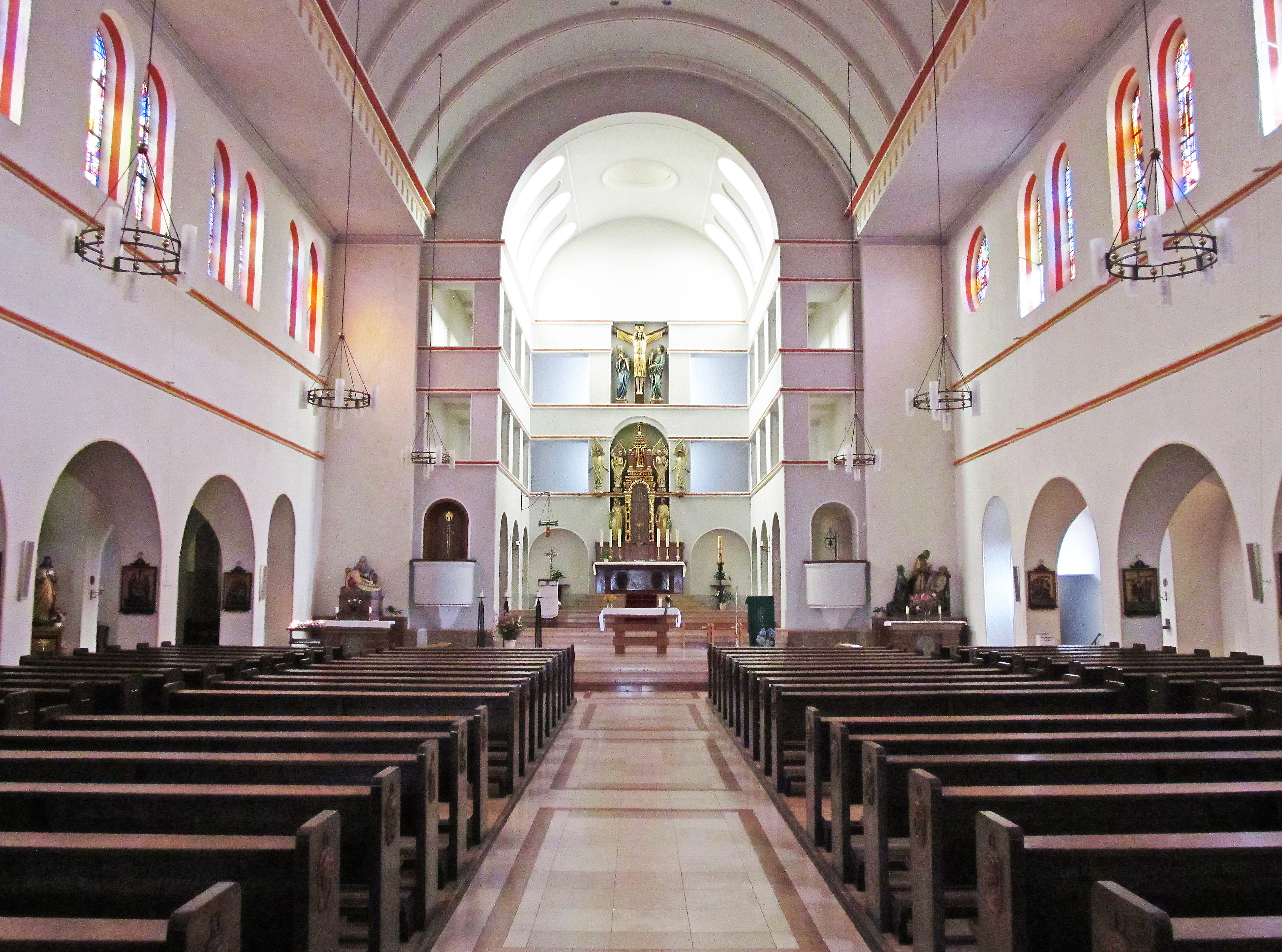 Blick ins Innere der katholischen Pfarrkirche Allerheiligen in Sulzbach, Saarland